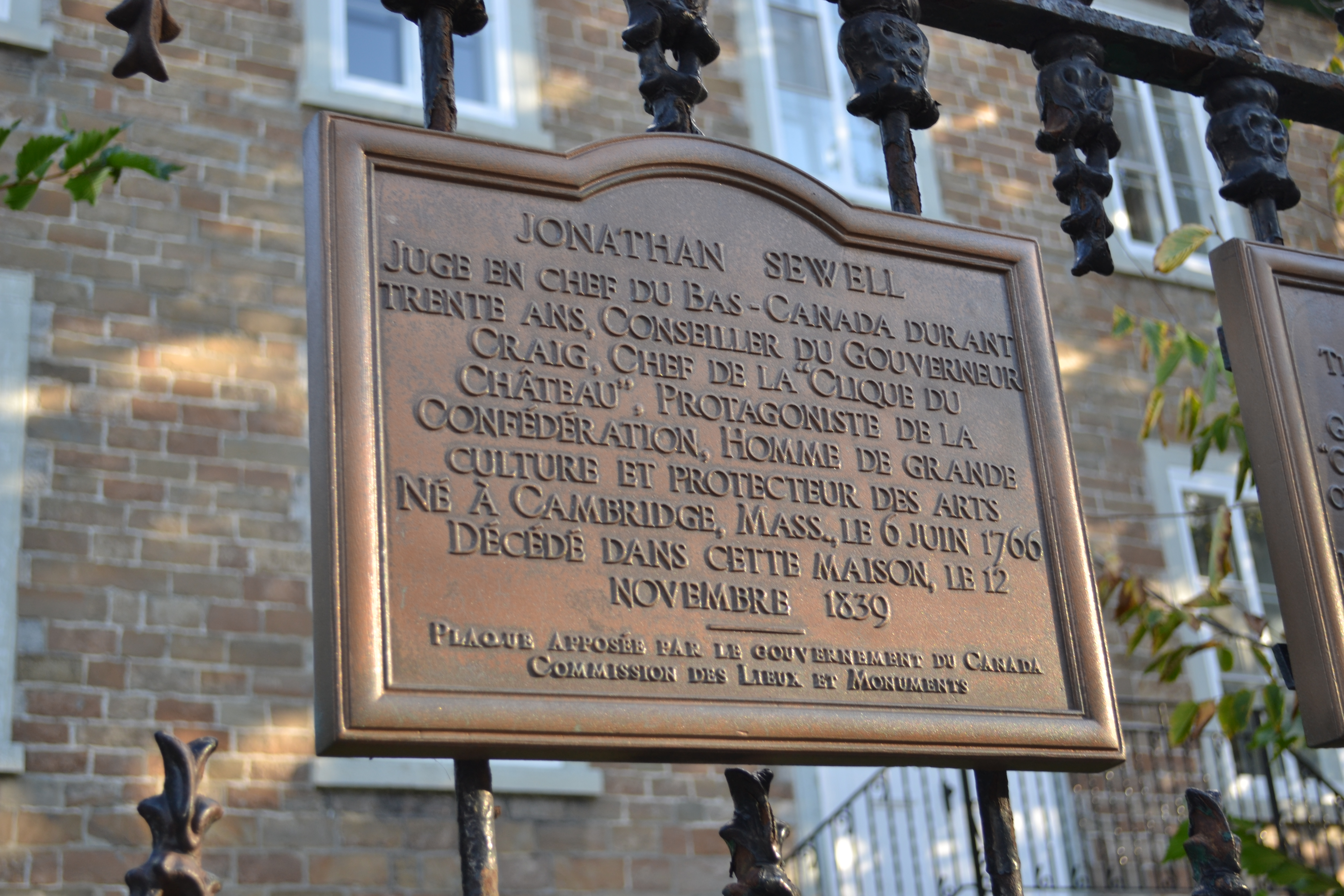 Maison Sewell, 87, rue Saint-Louis, Québec (Canada). (Protection LHN. Voir la liste des lieux patrimoniaux de Québec pour plus de détails).